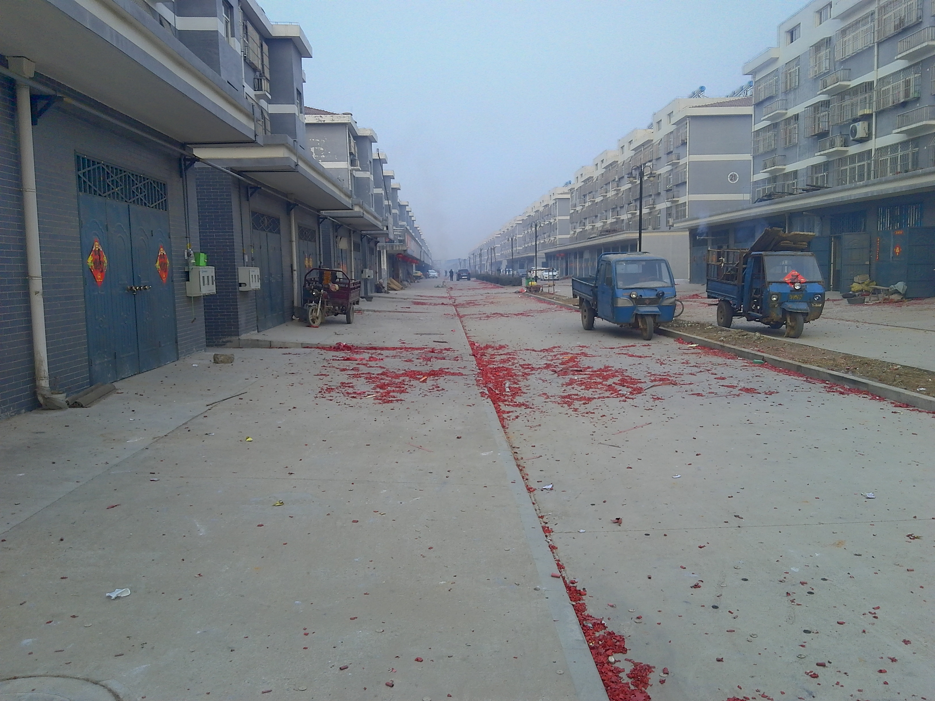 中文（中国大陆）: 平阴县孝直镇和圣苑